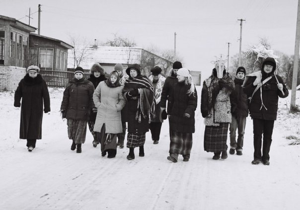 Княжыч калядуе